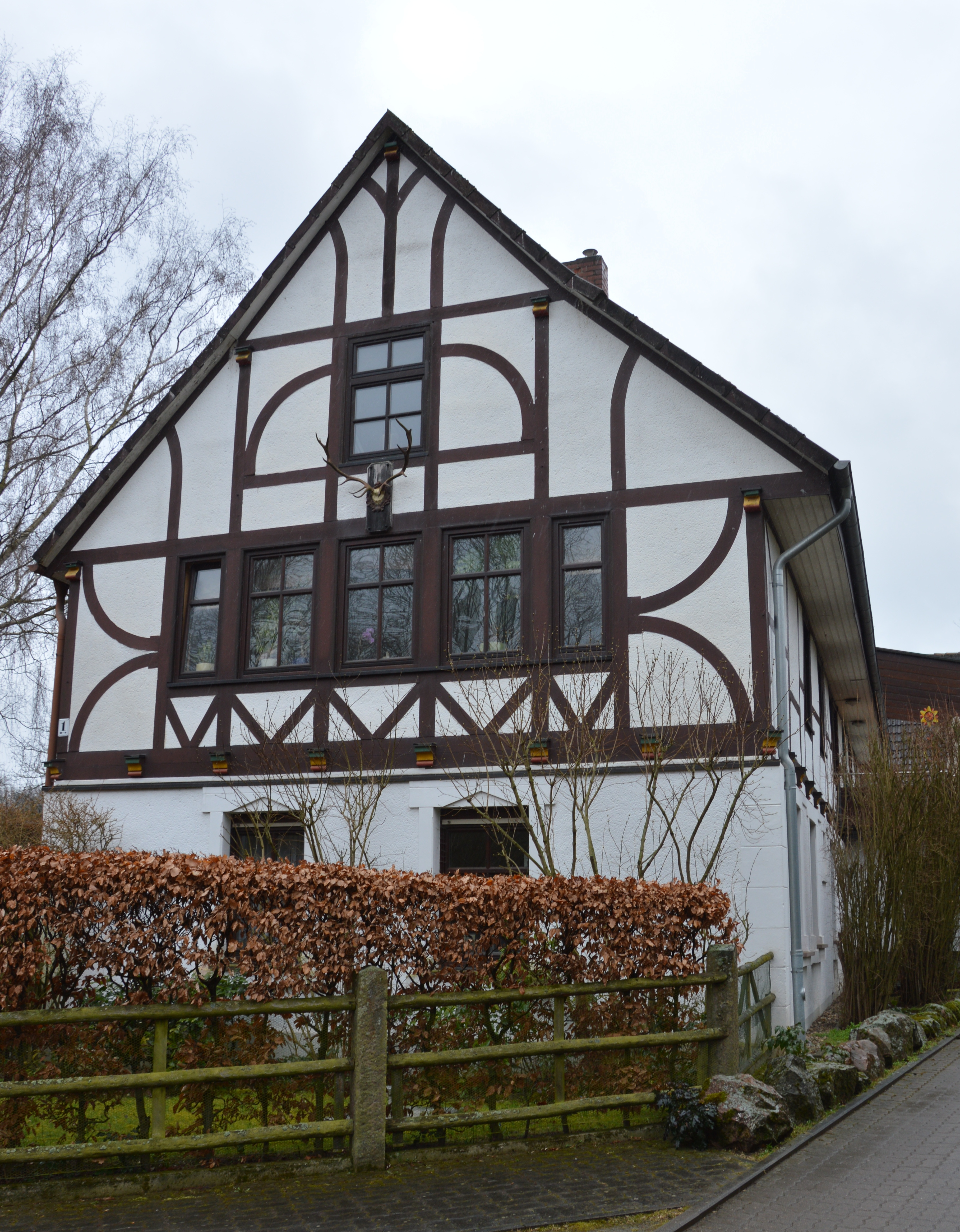 Haus in Papenberg